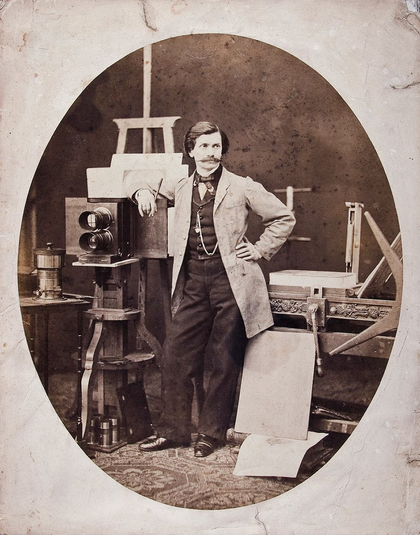 Maksymilian Fajans 1861